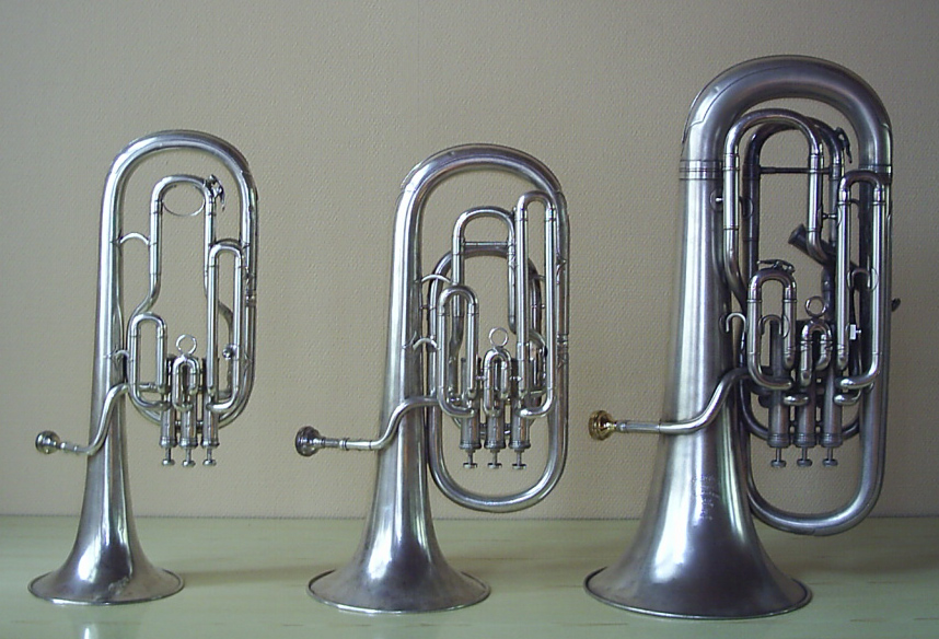 Ett althorn stämt i Eb, ett Baryton stämt i Bb och ett Eufonium stämt i Bb. Fotograf:Tubaist